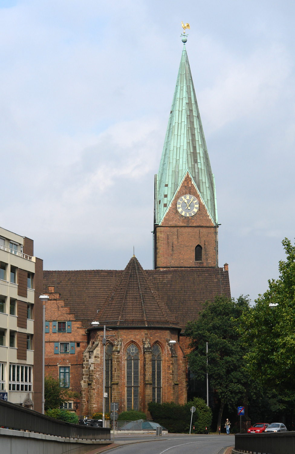 St.-Martini-Kirche in Bremen. Blick von der Martinistraße/Weserbrücke